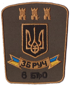 Нарукавний шеврон 6 б ТрО Тернопільської області «Збруч» Збройних сил України, в/ч В0122.